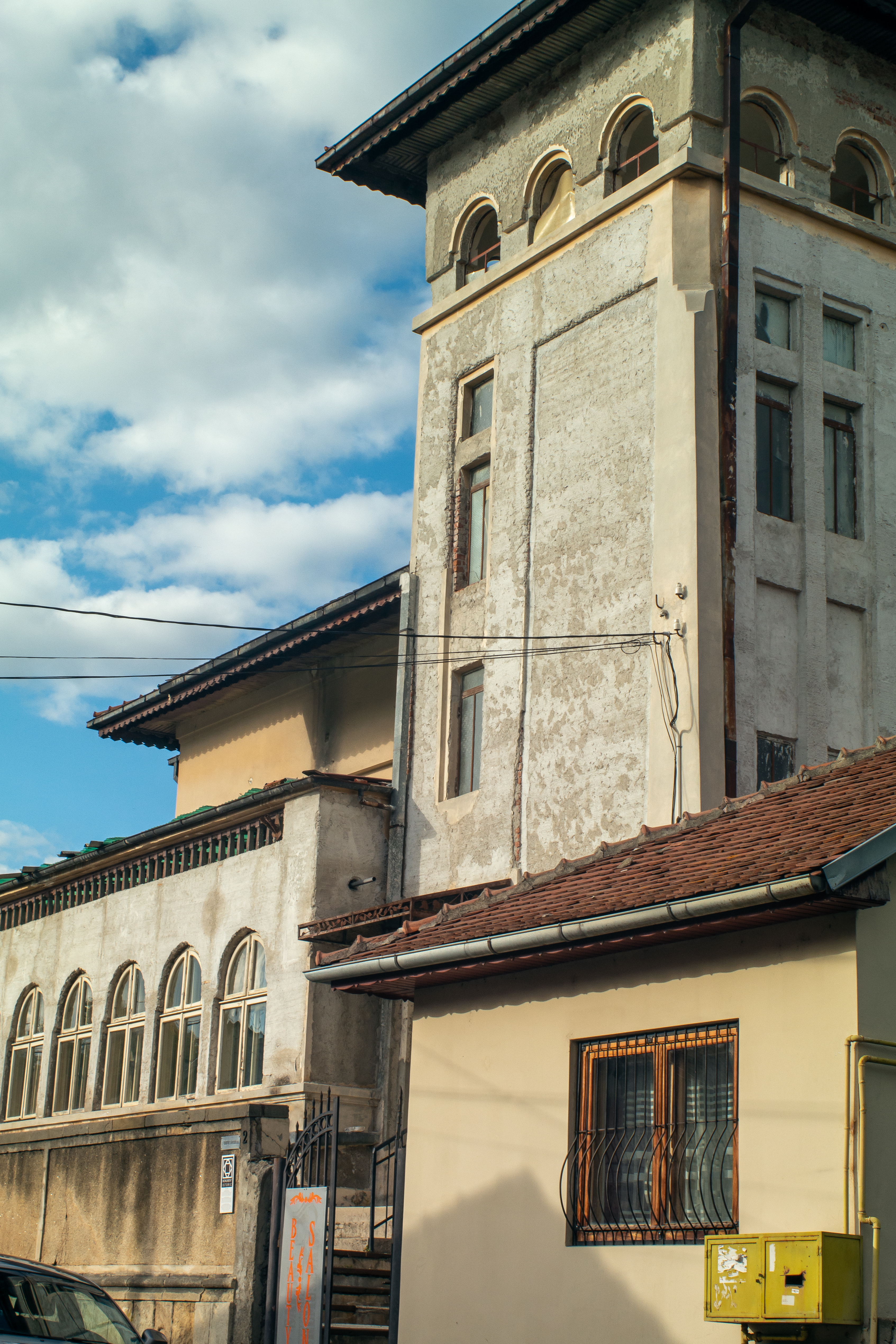 Fosta clădire a Poliției, azi căminul Liceului economic. Construcție a stilului neoromânesc adaptat instituțiilor publice din perioada interbelică. Elemente de factură locală precum motivul turnului-foișor sunt integrate unui volum dinamic, modern, în care apar și elemente Art Deco.